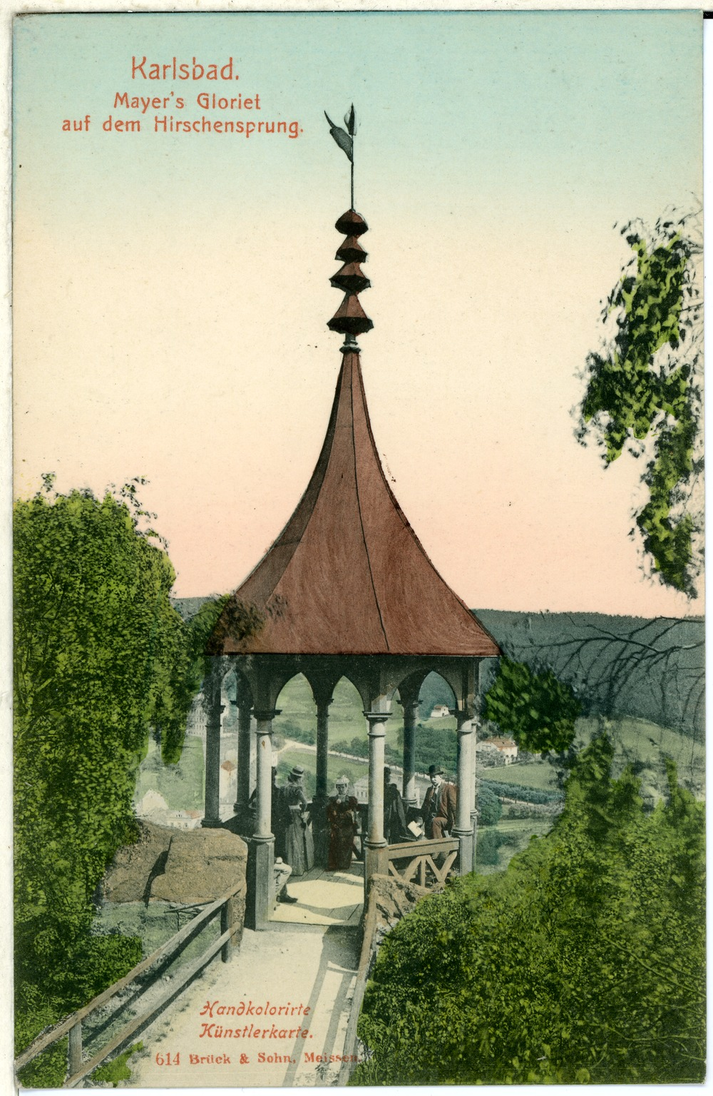 Karlsbad; Mayer`s Gloriet auf dem Hirschsprung This postcard is from publisher Brück & Sohn in Meißen ( This postcard has a unique number 00614 and is available in a higher resolution at the publisher. This images was uploaded in a cooperation project between Wikipedians and the publisher.